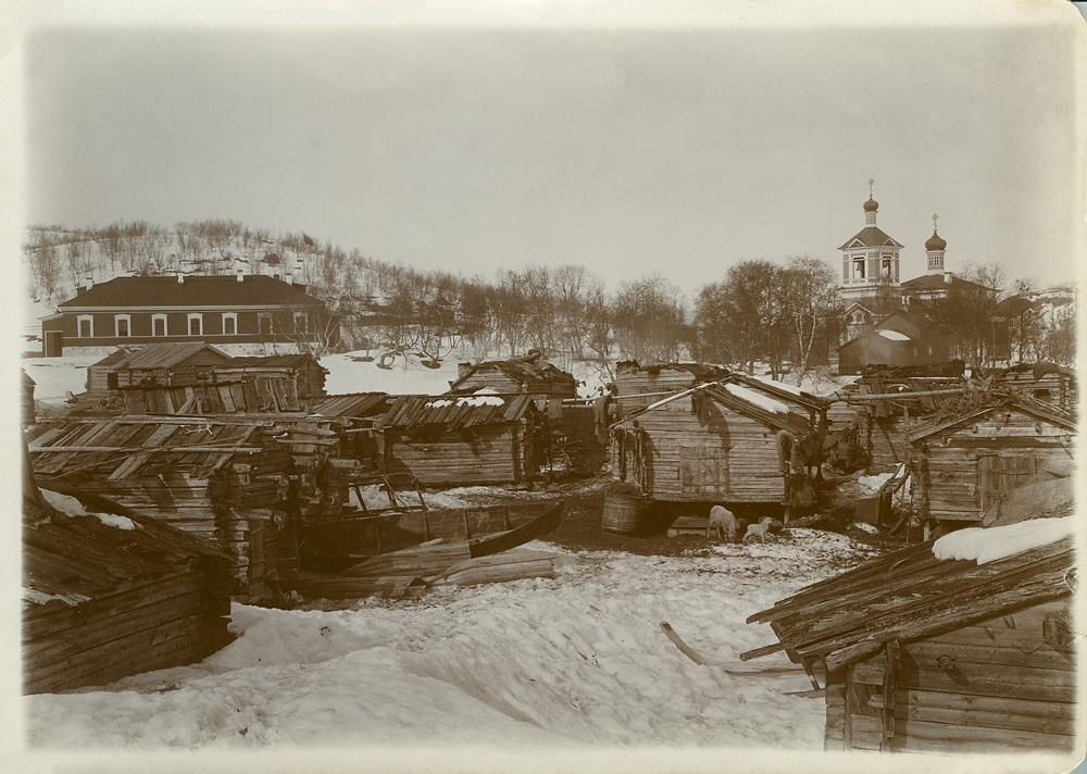 Wessel, Ellisif Rannveig Bosettning i Boris Gleb. I bakgrunnen Pechenga klosterkirke. NMFF.002139